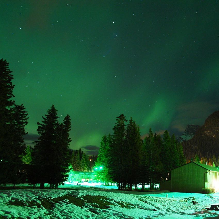 Aurora at Banff, Canada.